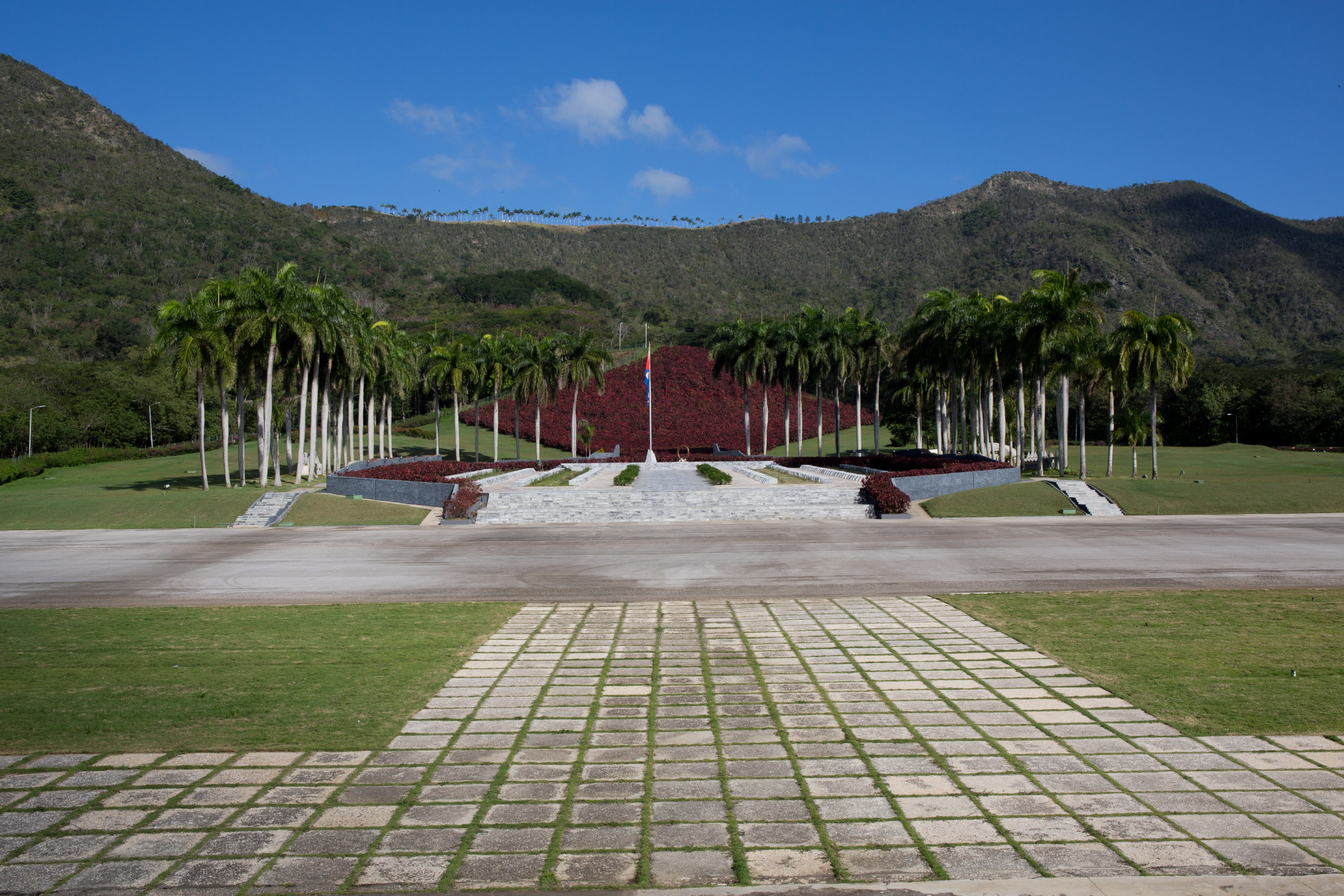 Mayarí arriba, Mausoleo Segundo Frente Oriental Frank País